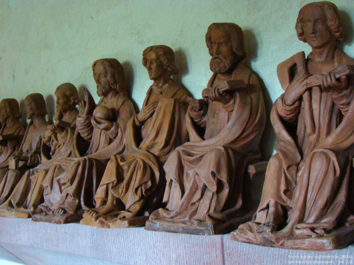 Historische Tonfiguren in der Gangolfskapelle in Neudenau